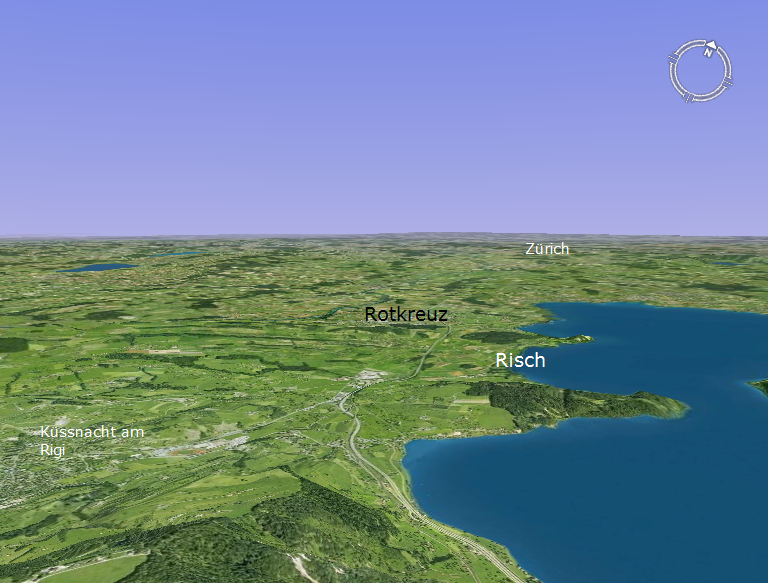 Blick von der Rigi auf die Gemeinde Risch-Rotkreuz und den Zugersee.